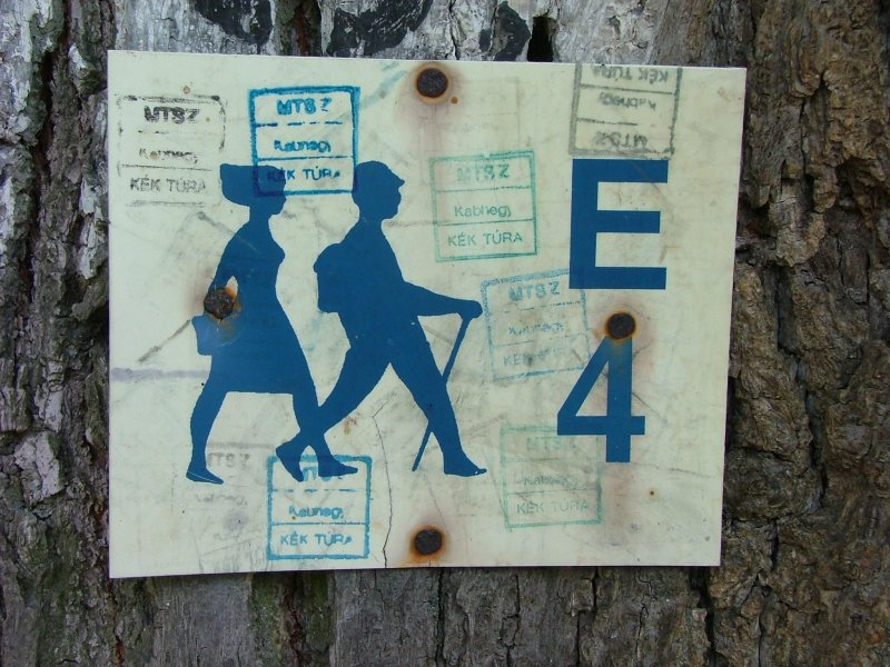 Az Országos Kéktúrán Kab-hegy környékén lévő bélyegzési pont (Veszprém megye, Magyarország)